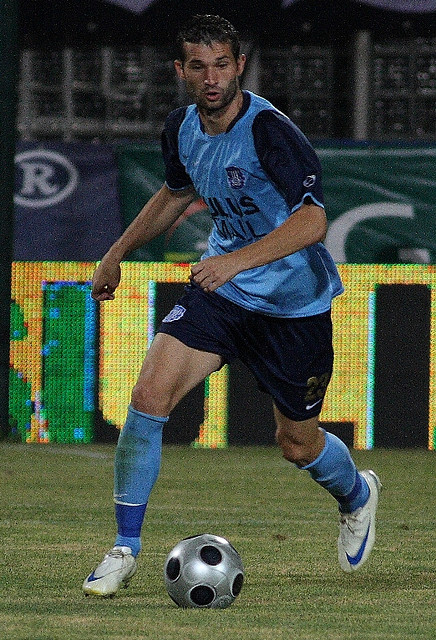 Adrian Ilie (fotbalist născut în 1981) la Poli Iasi